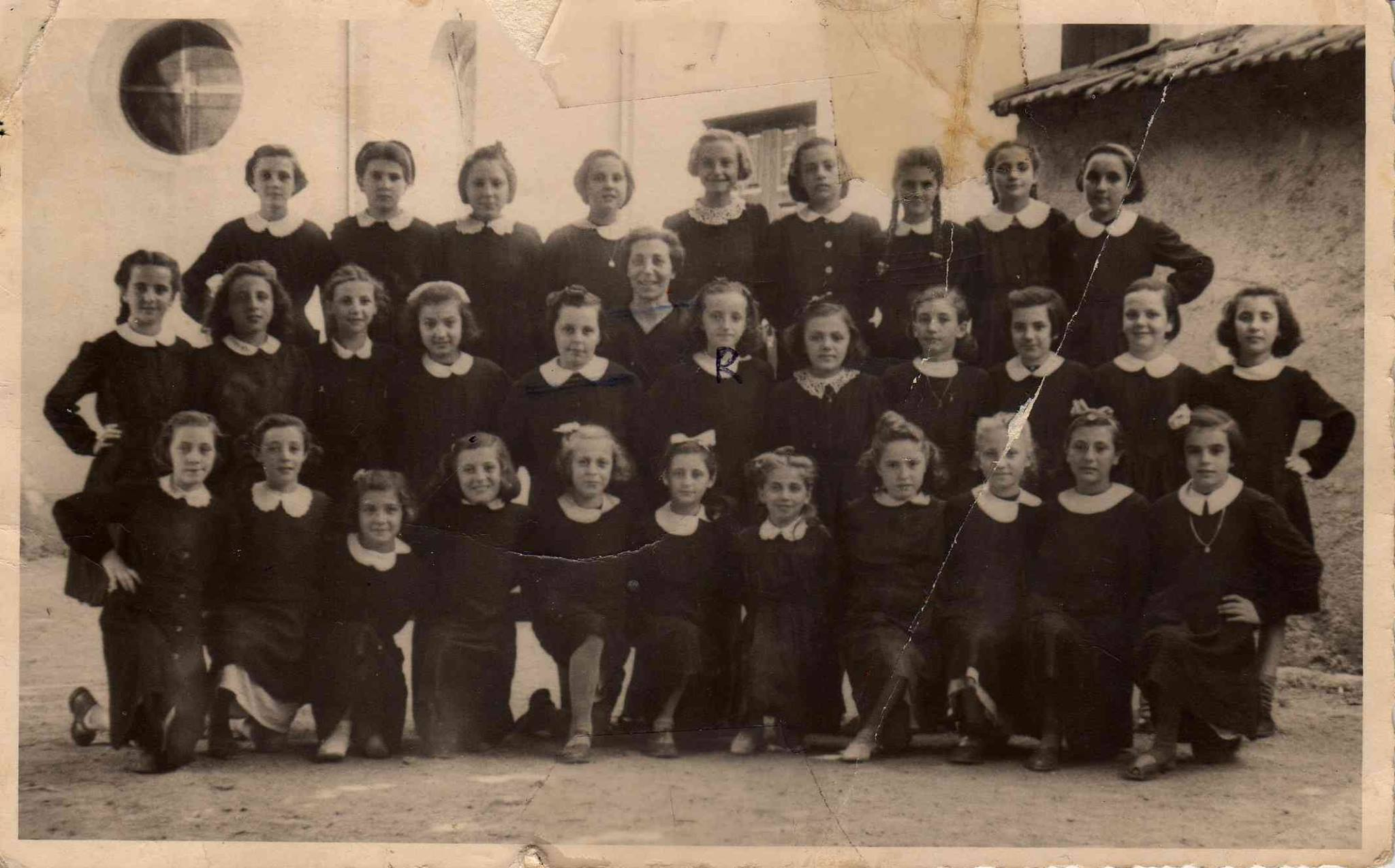 L'atleta e insegnante di educazione fisica Maria Piantanida (al centro) con la classe 5ª elementare dell'anno scolastico 1949/1950 presso l'Istituto Maria Immacolata di Busto Arsizio.